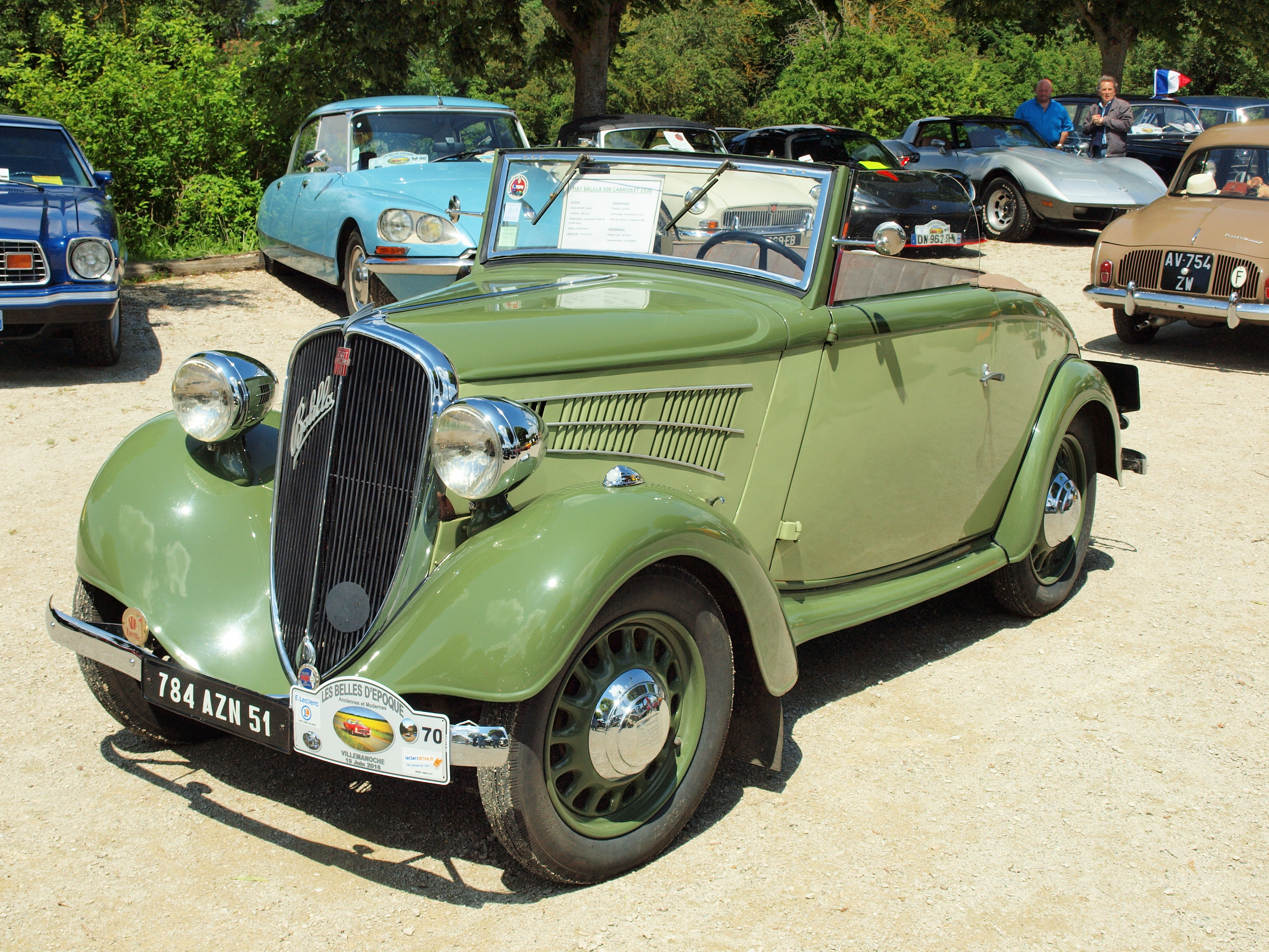 Rassemblement 2016 des véhicules anciens à Villemanoche (Yonne, France) ; Fiat Balilla 508 cabriolet de 1936 ; licence SIMCA